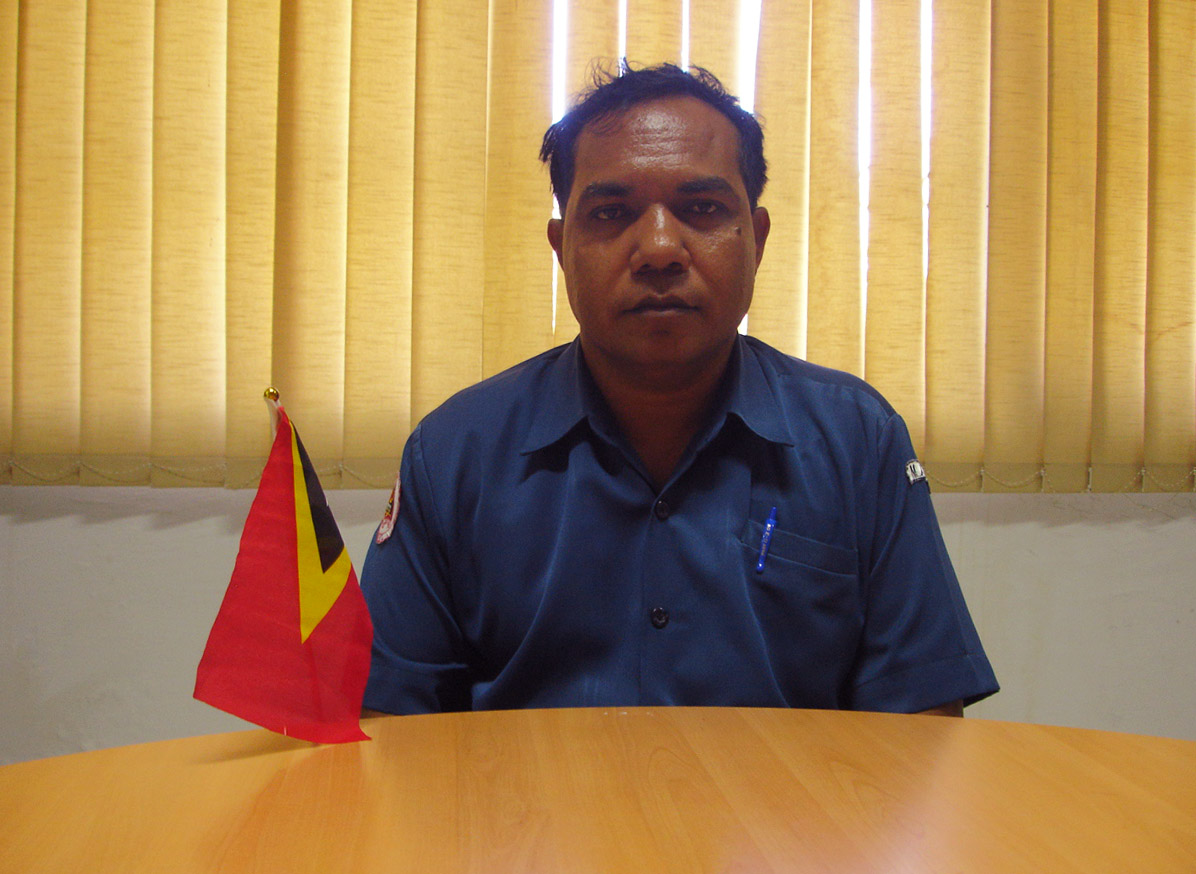 Anibal do Rosario Sarmento, Administrator des Subdistrikts Viqueque